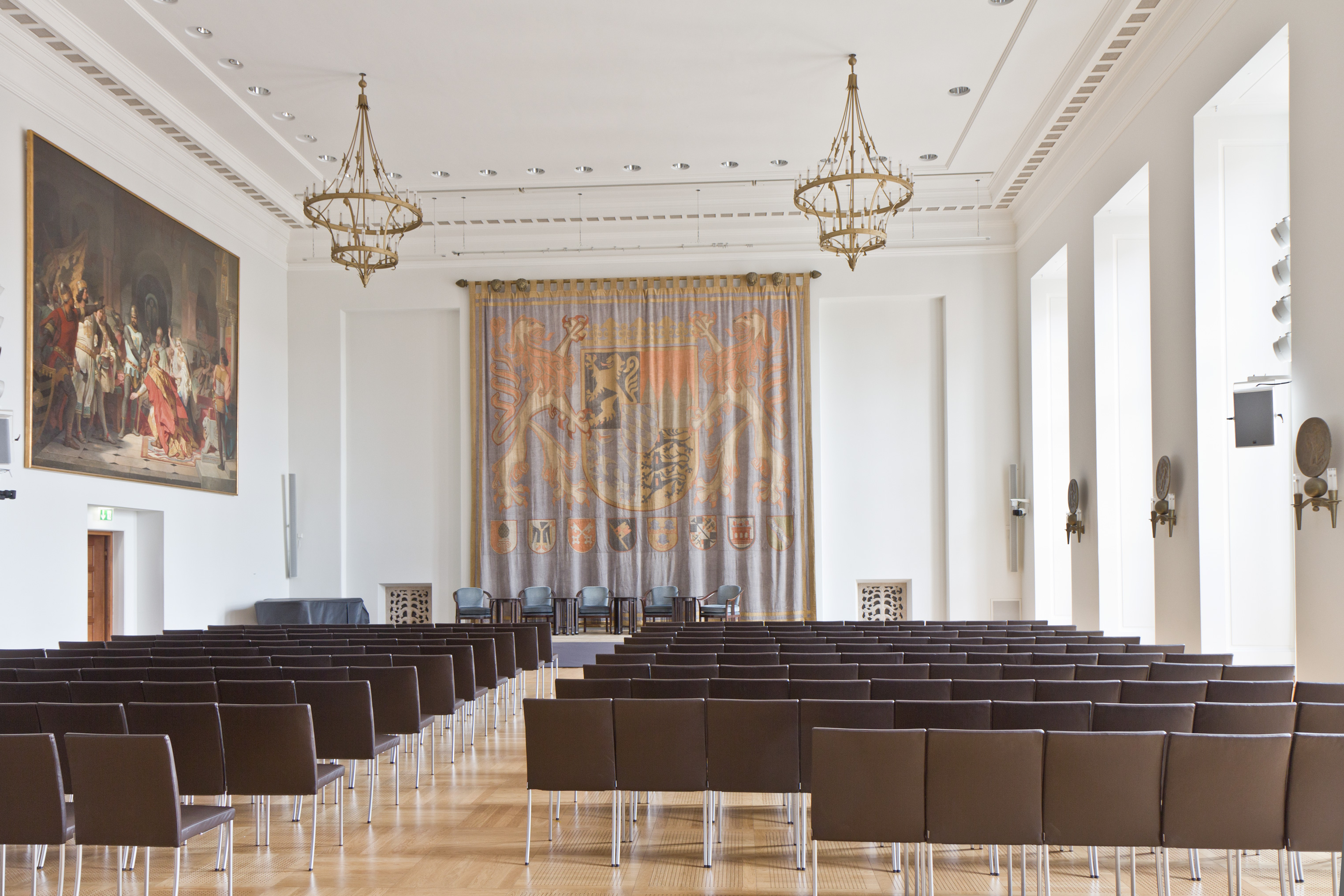 Wikipedia im Landtag – Bayern 17. bis 19. Juli 2012 in München Dieses Foto wurde im Rahmen des Projektes „Wikipedia im Landtag“ erstellt.